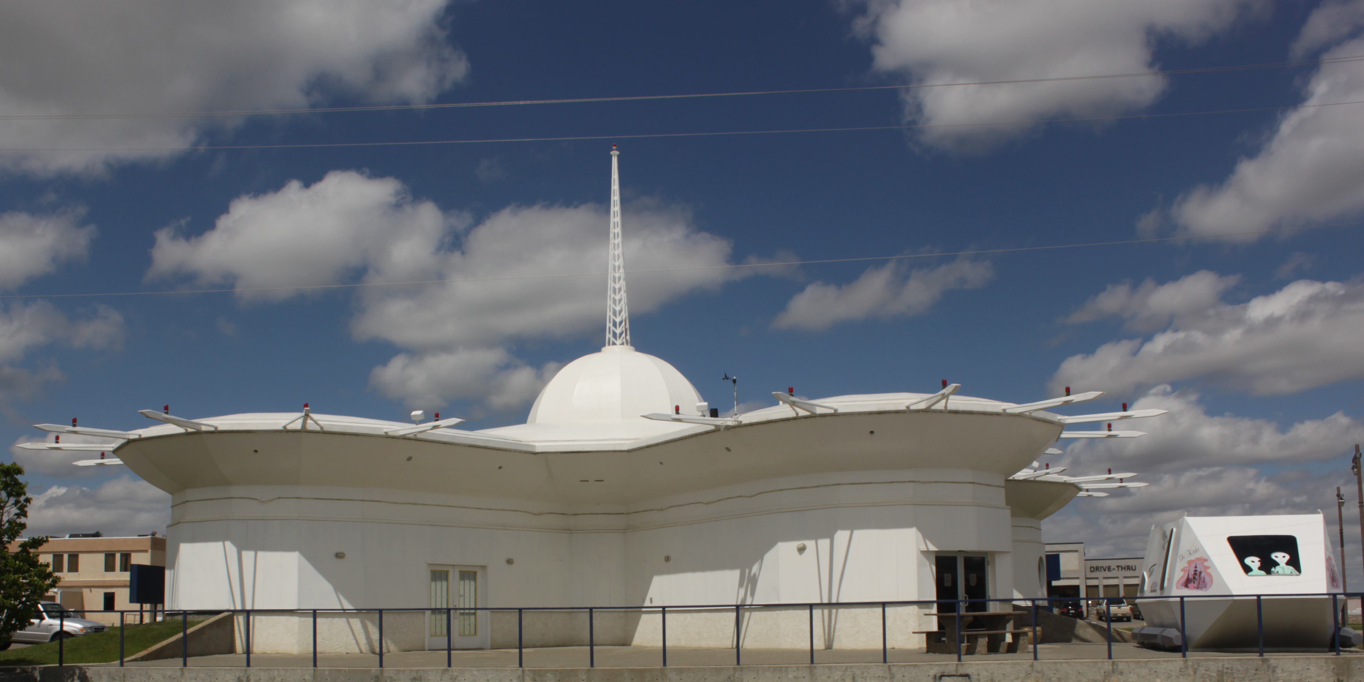 after upload